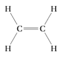 wiązanie etylenu, C2H4